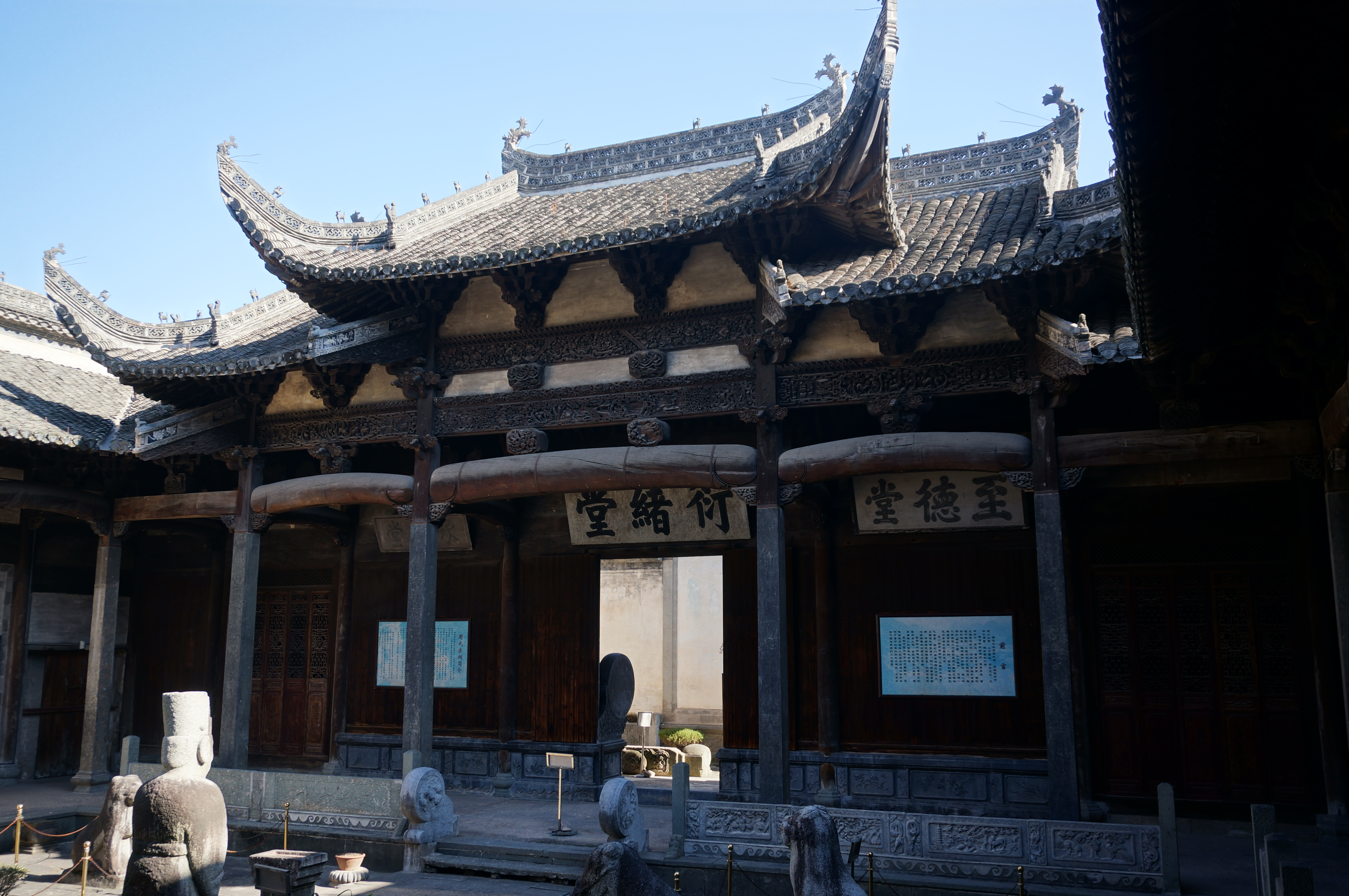 绩溪周氏宗祠，门楼背面（西面）。